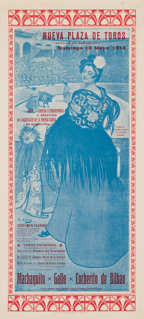 Nueva plaza de toros. Arenas de Barcelona. Domingo 18 Mayo 1913.